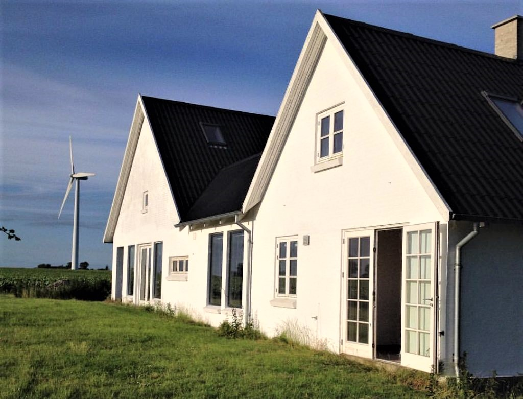 Kunstnerresidency Artlab Kettinge in Danmark,Lolland (part of Galleri Heike Arndt DK)